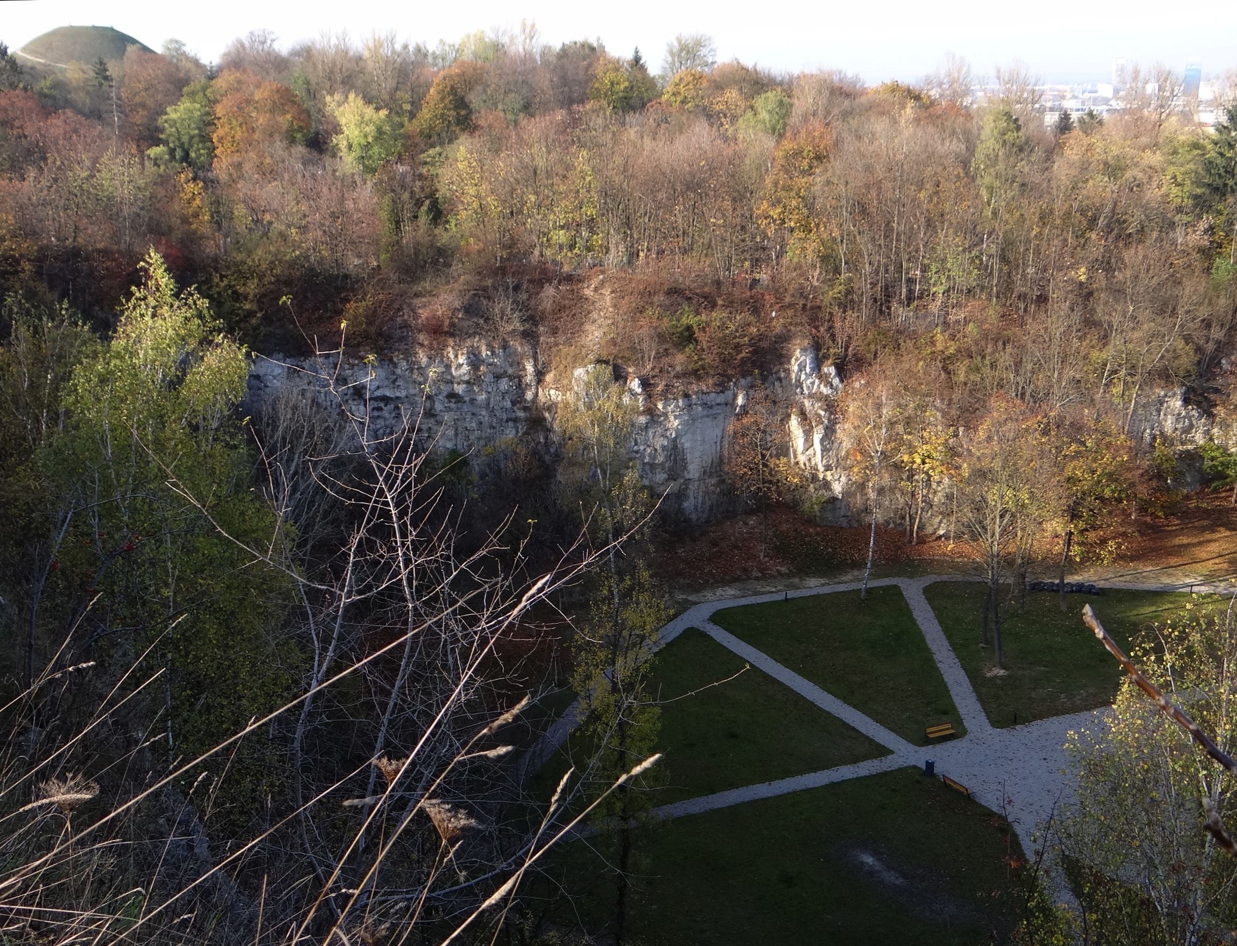 Kamieniołom Miejski na Krzemionkach w Krakowie